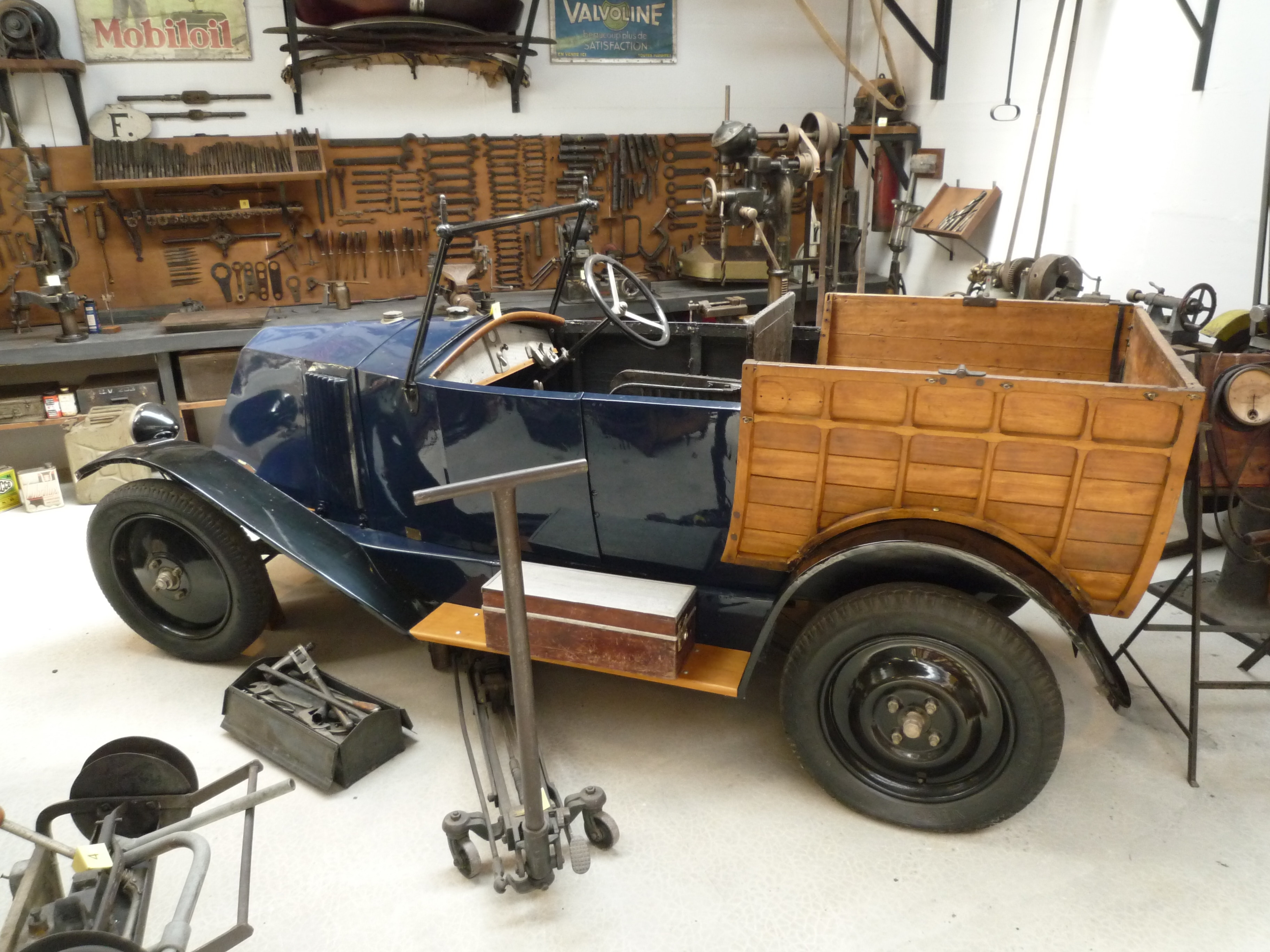 Voiture Renault Type KJ (vers 1920)